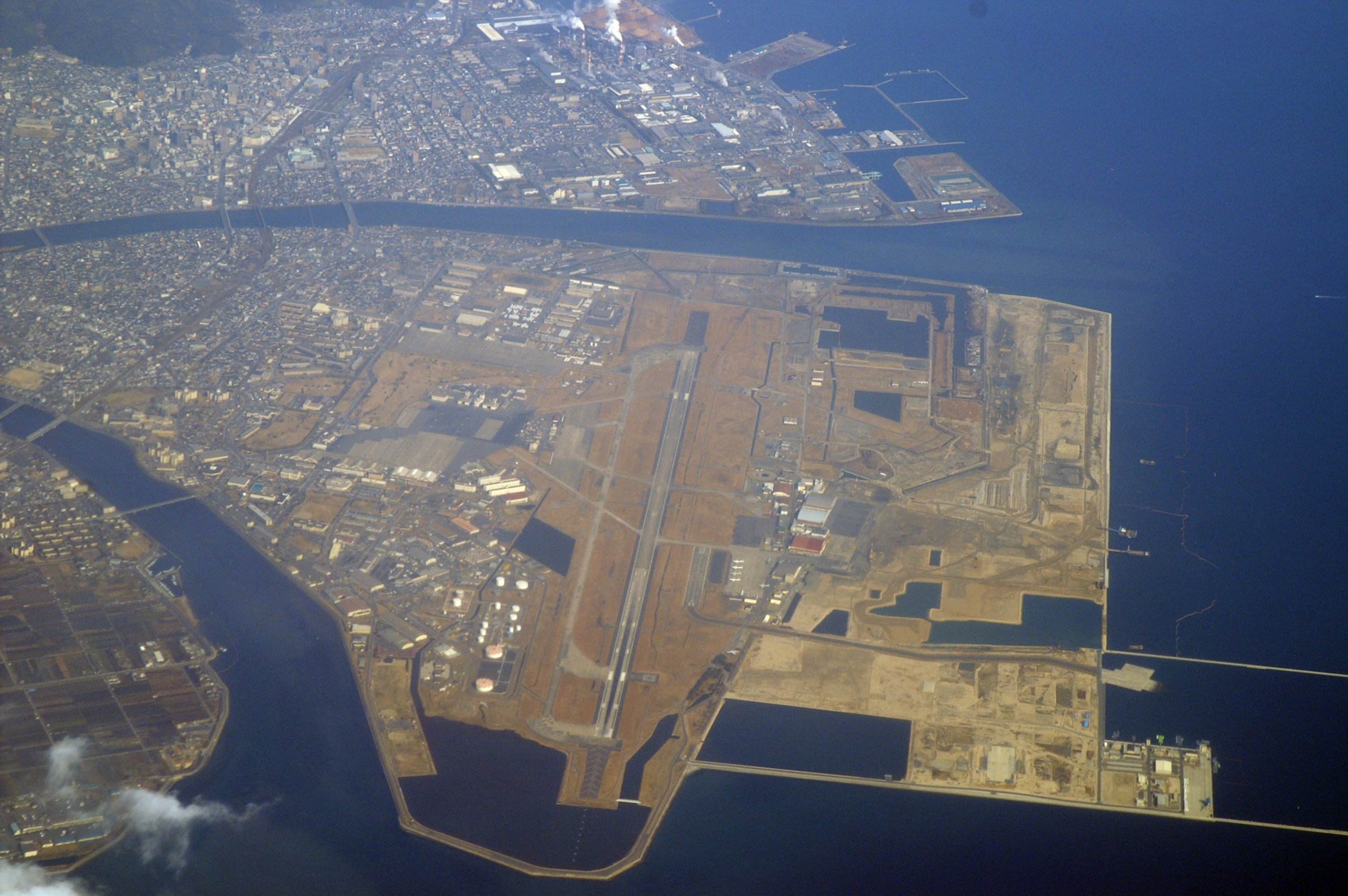 在日アメリカ海兵隊と海上自衛隊の岩国航空基地。 (2007/02/12 In Flight, JL3592, Iwakuni, Yamaguchi, JAPAN)